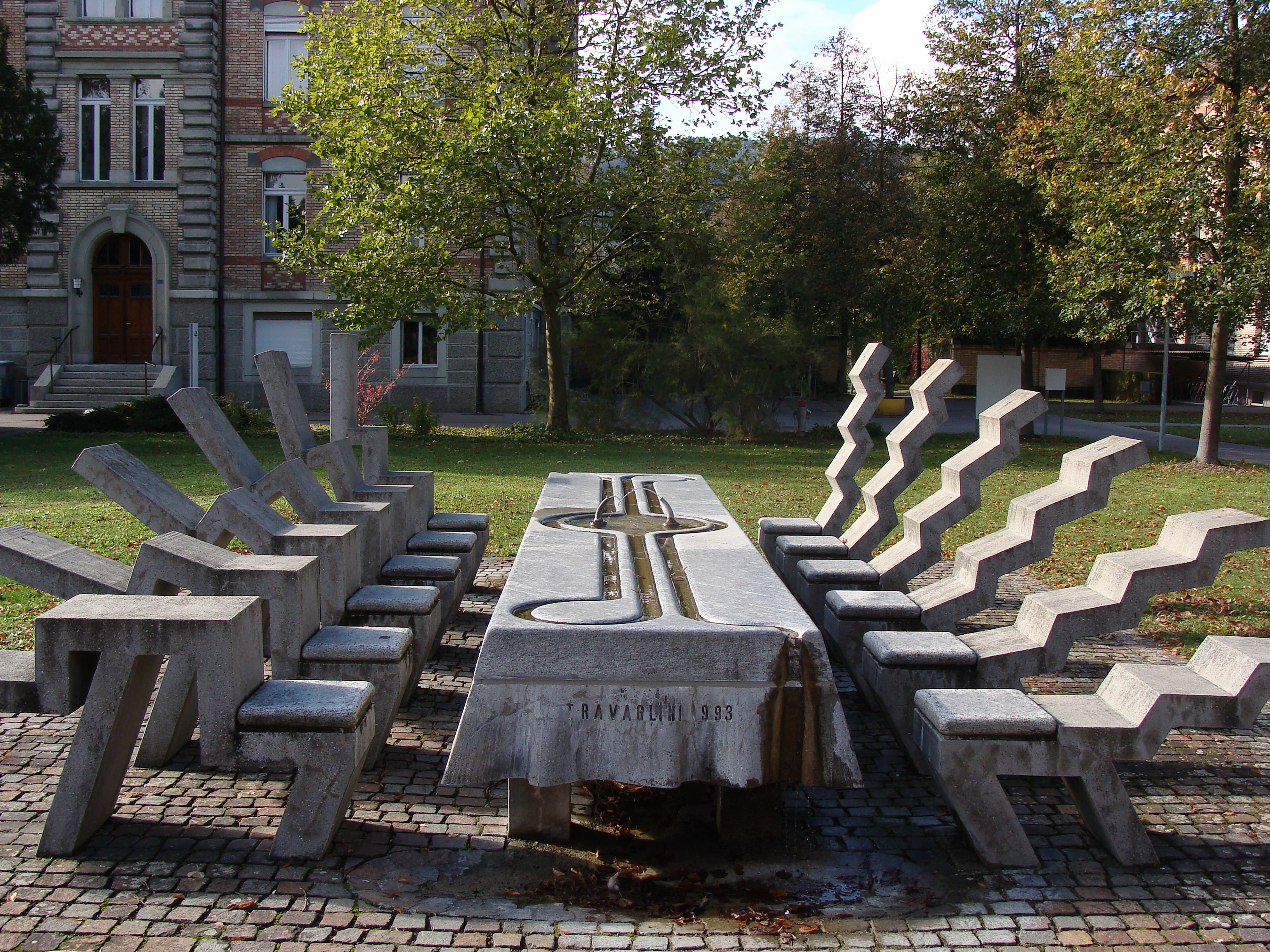 28″ N, 7° 33′ 25.38″ E